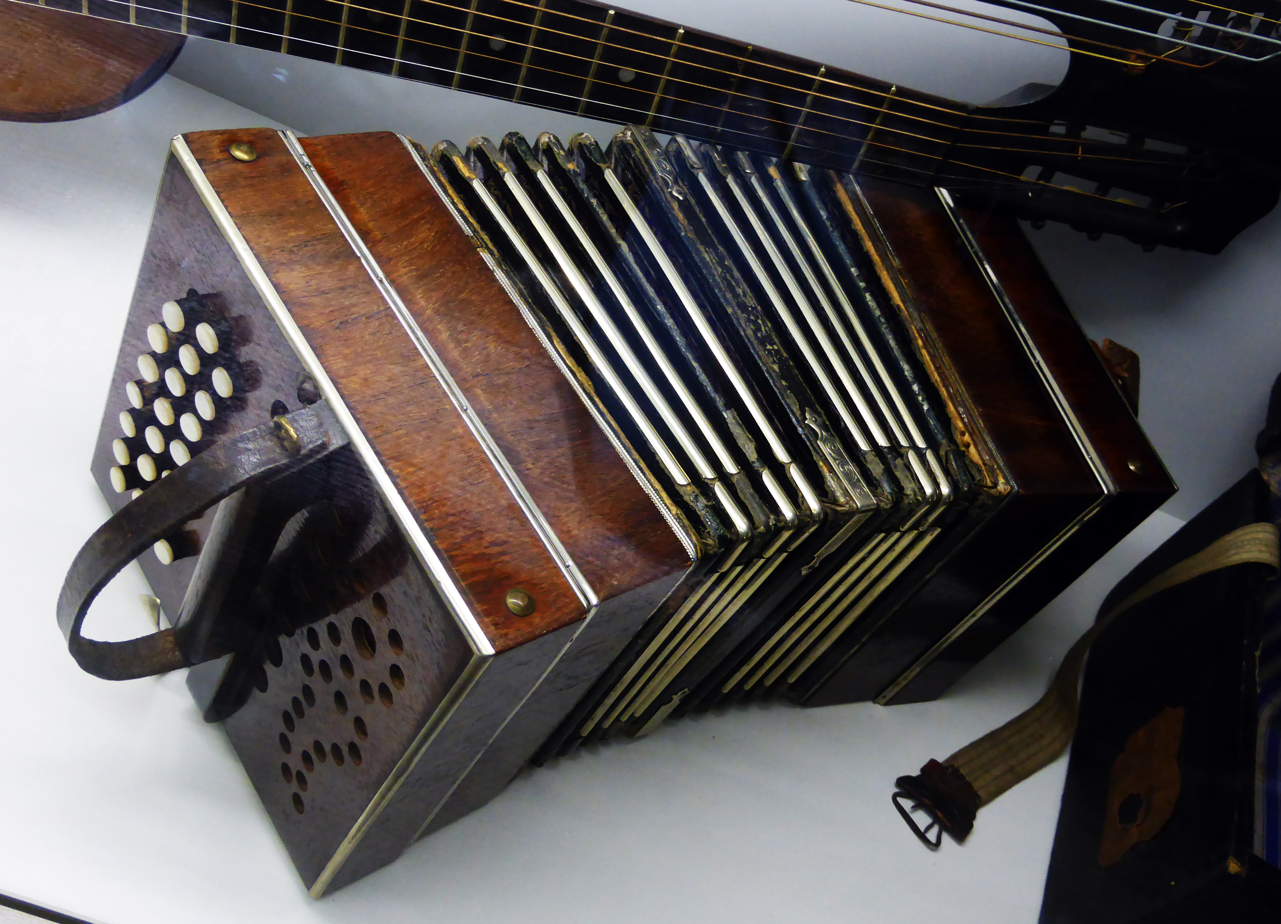 Bandoneon von F.Lange vormals C.F.Uhlig Harmonika Fabrik. Ausgestellt im Museum sächsisch-böhmisches Erzgebirge in Marienberg.